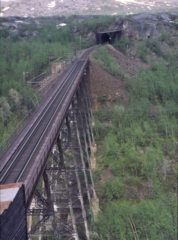 Jernbanebru bygget i 1901-1902, tatt ut av aktiv tjeneste i 1988. Fotografert fra søndre landfeste